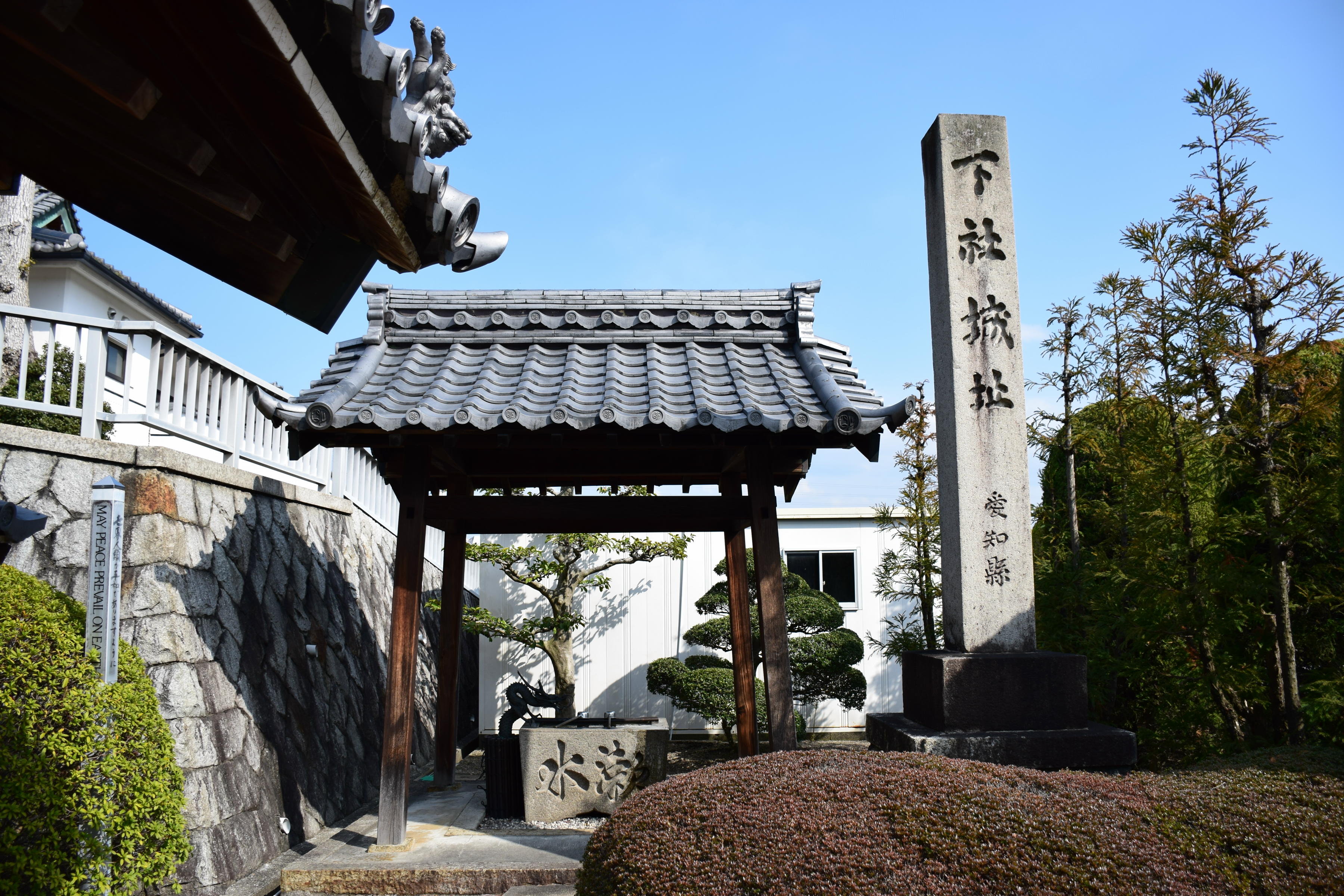 下社城址（妙徳寺）